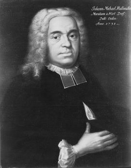 Prof. Johann Michael Hallwachs (1691-1738), Gemälde in der Tübinger Professorengalerie